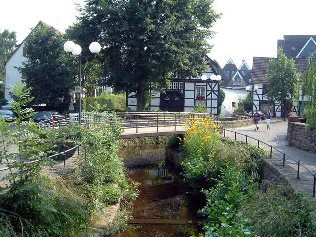 Das Bachviertel als historischer Kern in Herdecke; Herdecker Bach am Bachplatz